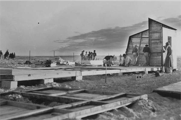 חלוצה - הקמת ישוב חדש בנגב